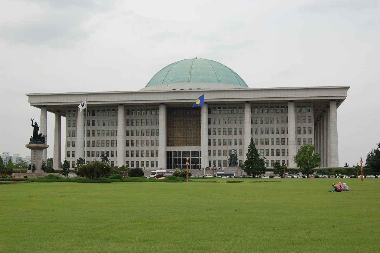 서울, 여의도에 위치한 국회의 모습 , National Assembly Building of South Korea located in Yeido, Seoul.